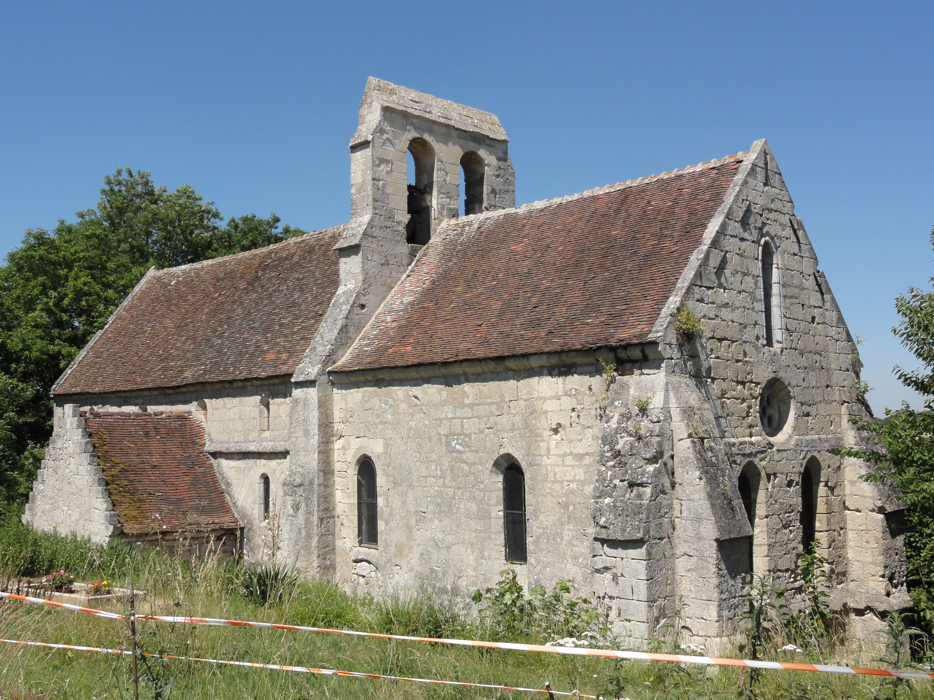 Longueval-Barbonval (Aisne) église de Barbonval